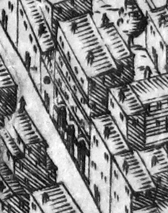 Pianta del buonsignori, dettaglio, loggia dei tessitori